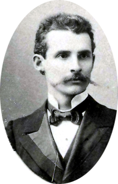 Яснопольский, Леонид Николаевич